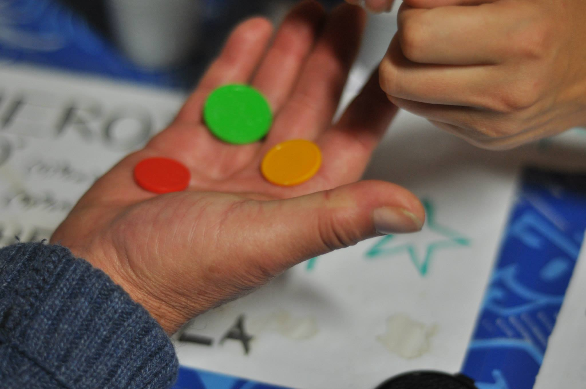 Steloj, Esperantaj moneroj, en la drinkejo dum Somera Esperanto-Studado 2013